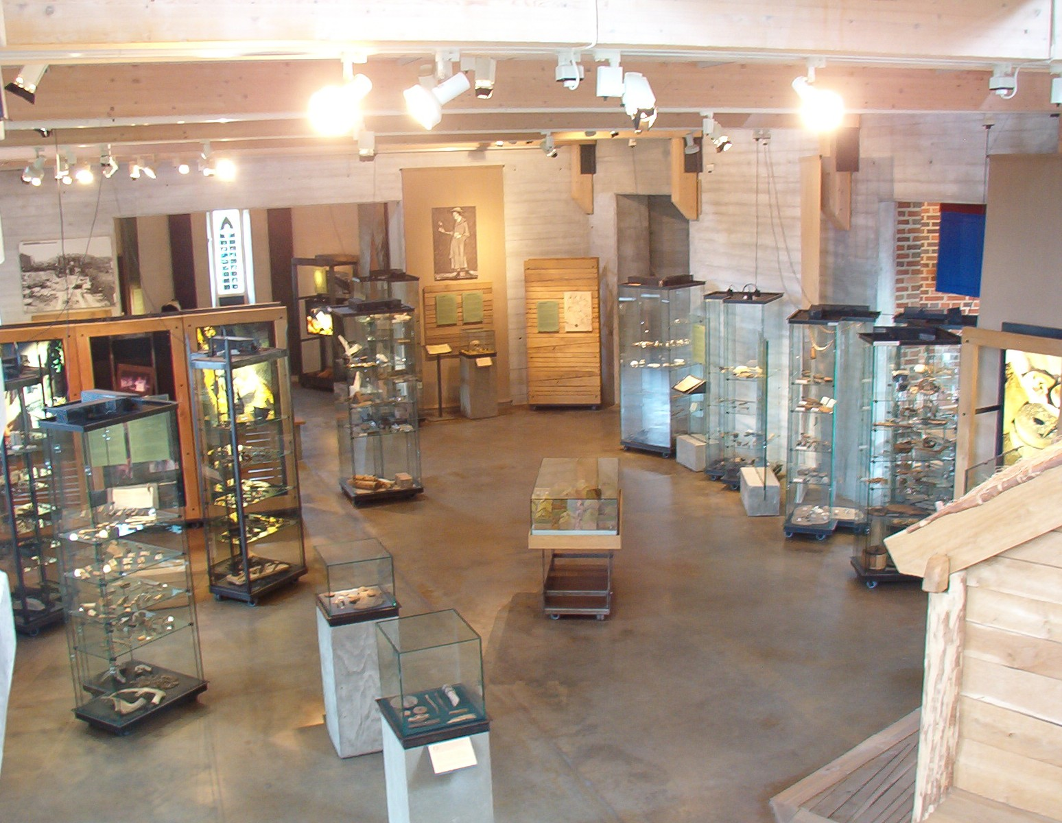 Lödöse museum interior August 2005